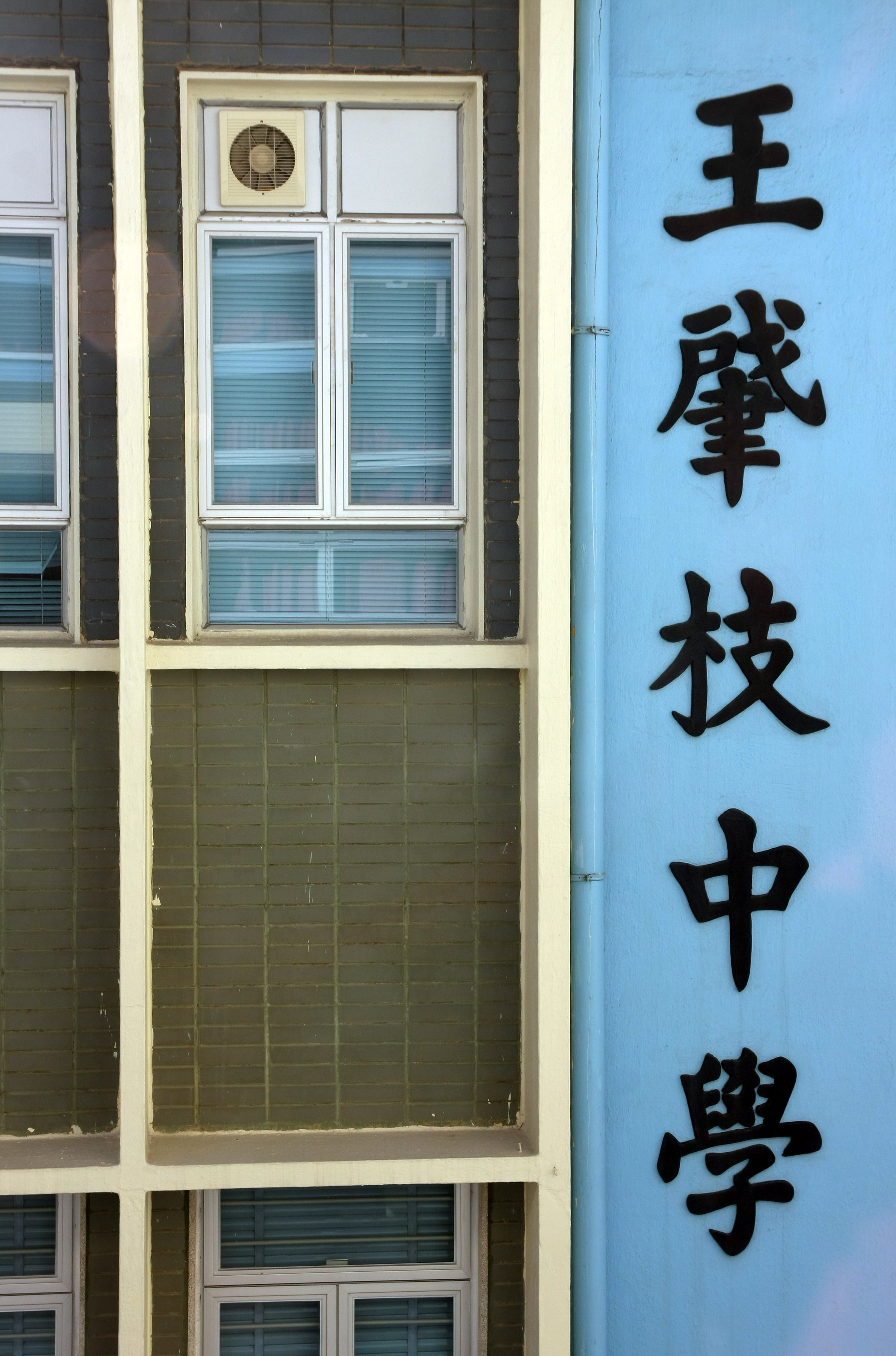 王肇枝中學舊校舍